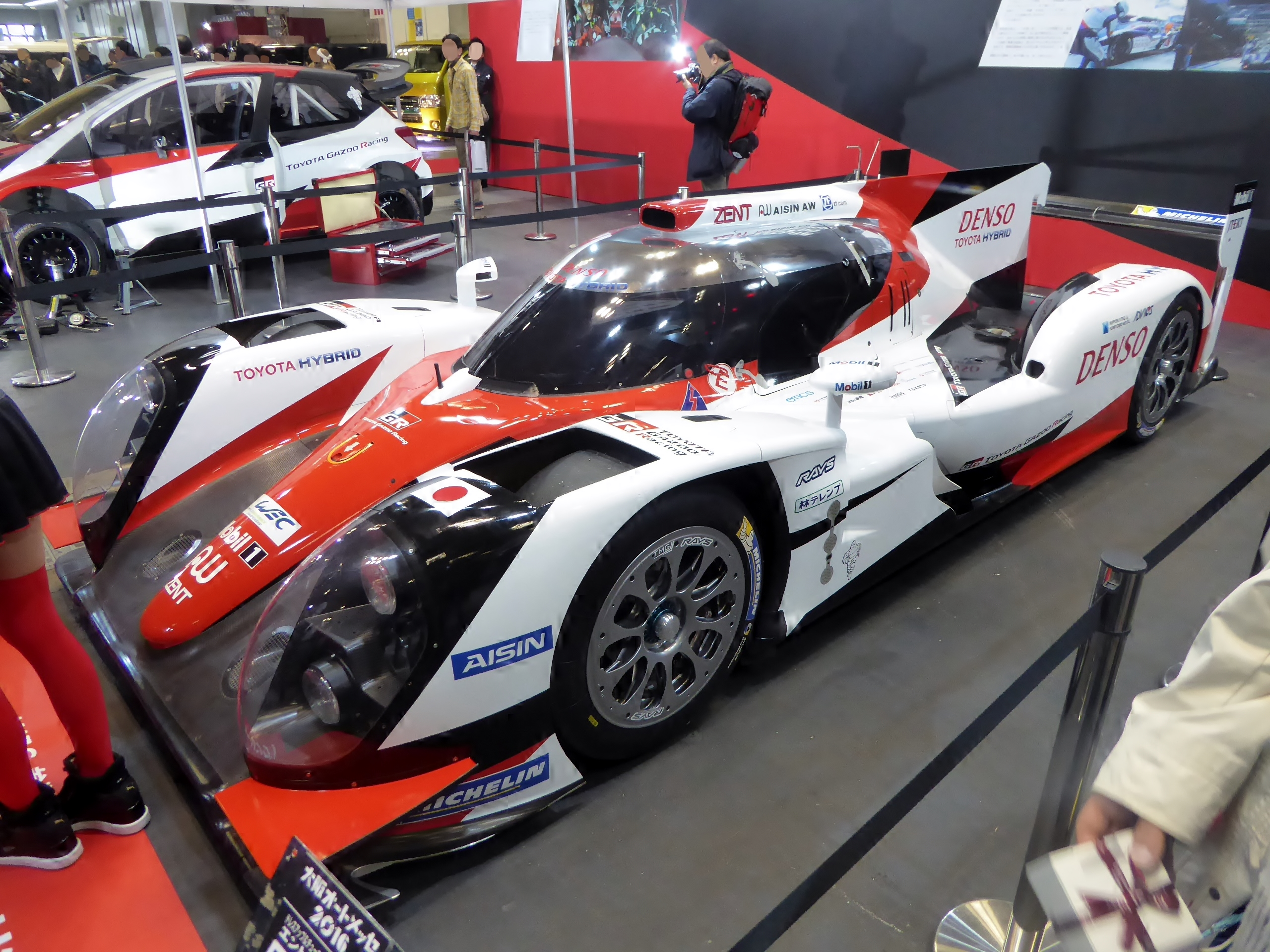 大阪オートメッセ2016においてトヨタ・TS050 HYBRIDの2016年仕様を撮影。